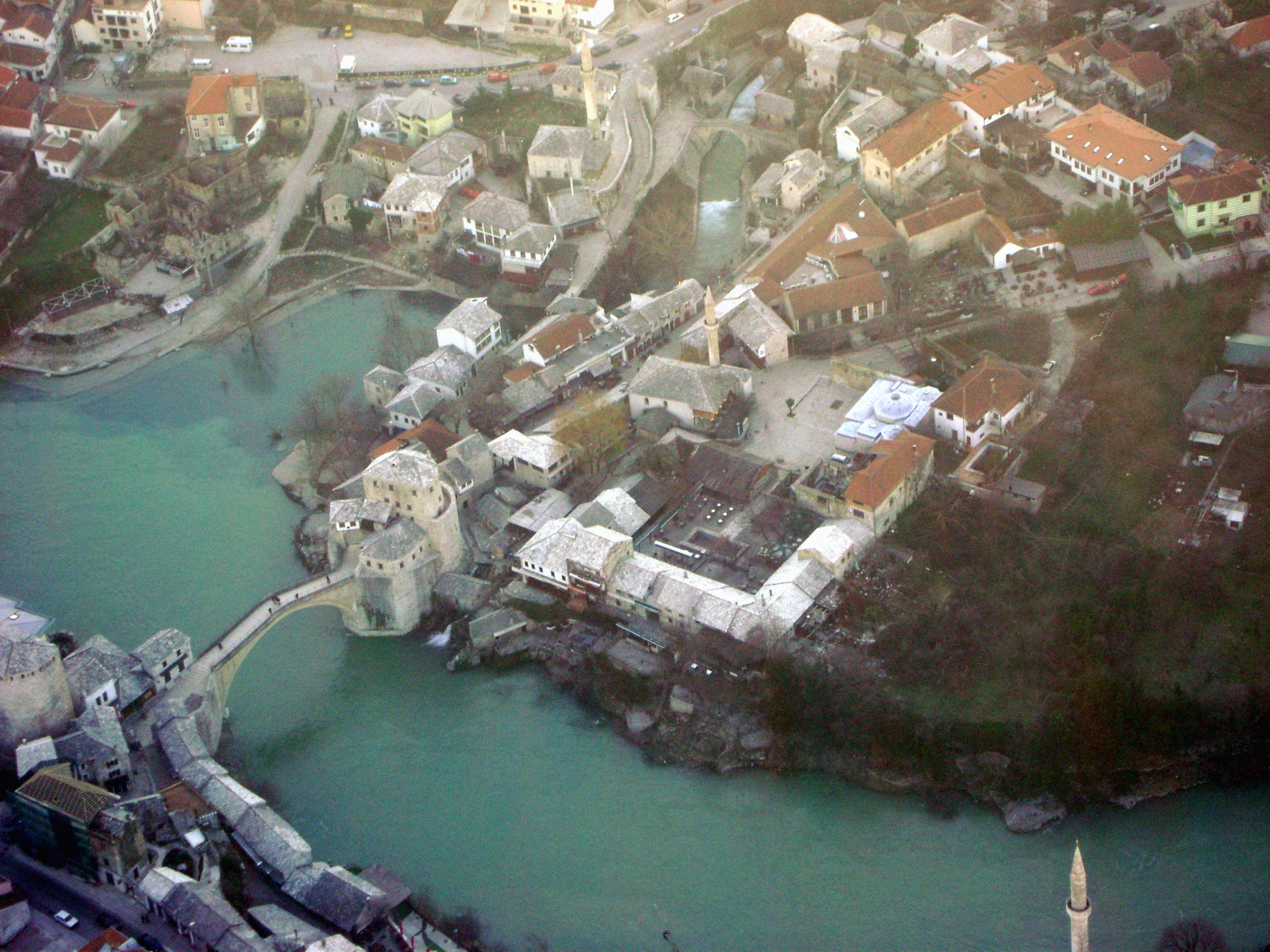 Innenstadt von Mostar mit Stari Most